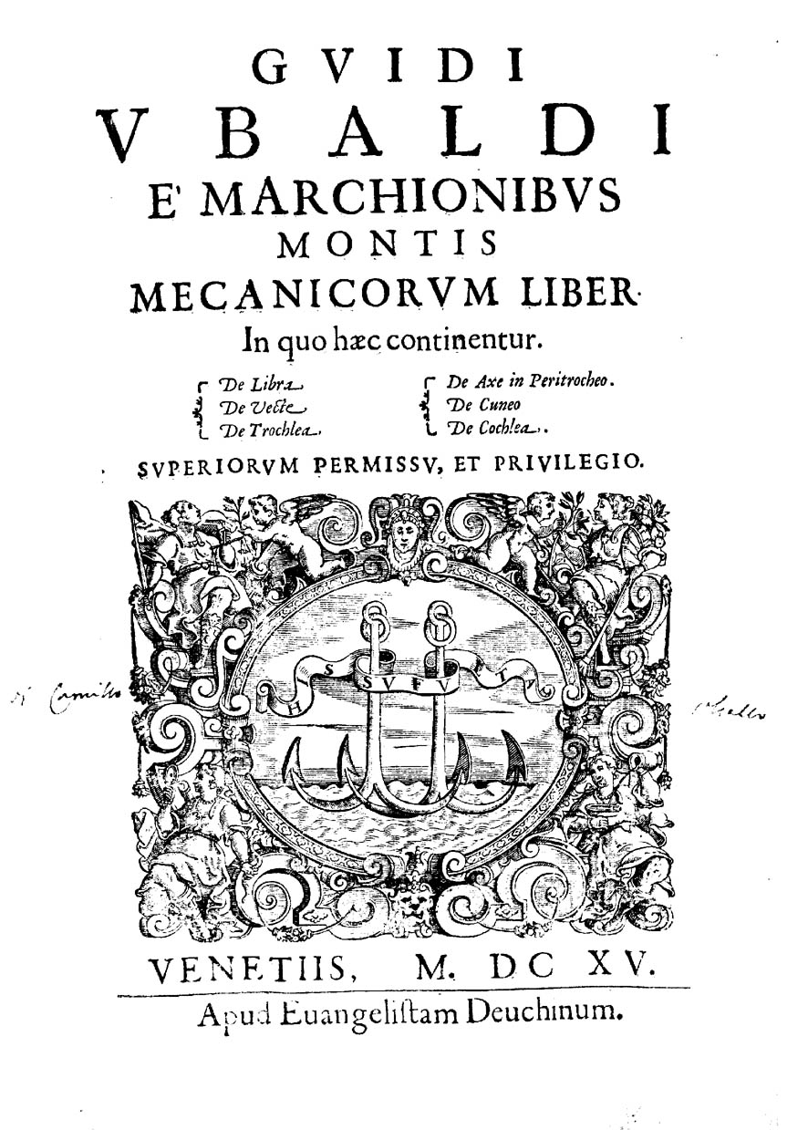 Guidi Vbaldi e marchionibus Montis Mecanicorum liber. In quo haec continentur. De libra. De vecte. De trochlea. De axe in peritrocheo. De cuneo. De cochlea. - Venetiis : apud Euangelistam Deuchinum, 1615. - [4], 104 c. : ill. ; 2° .